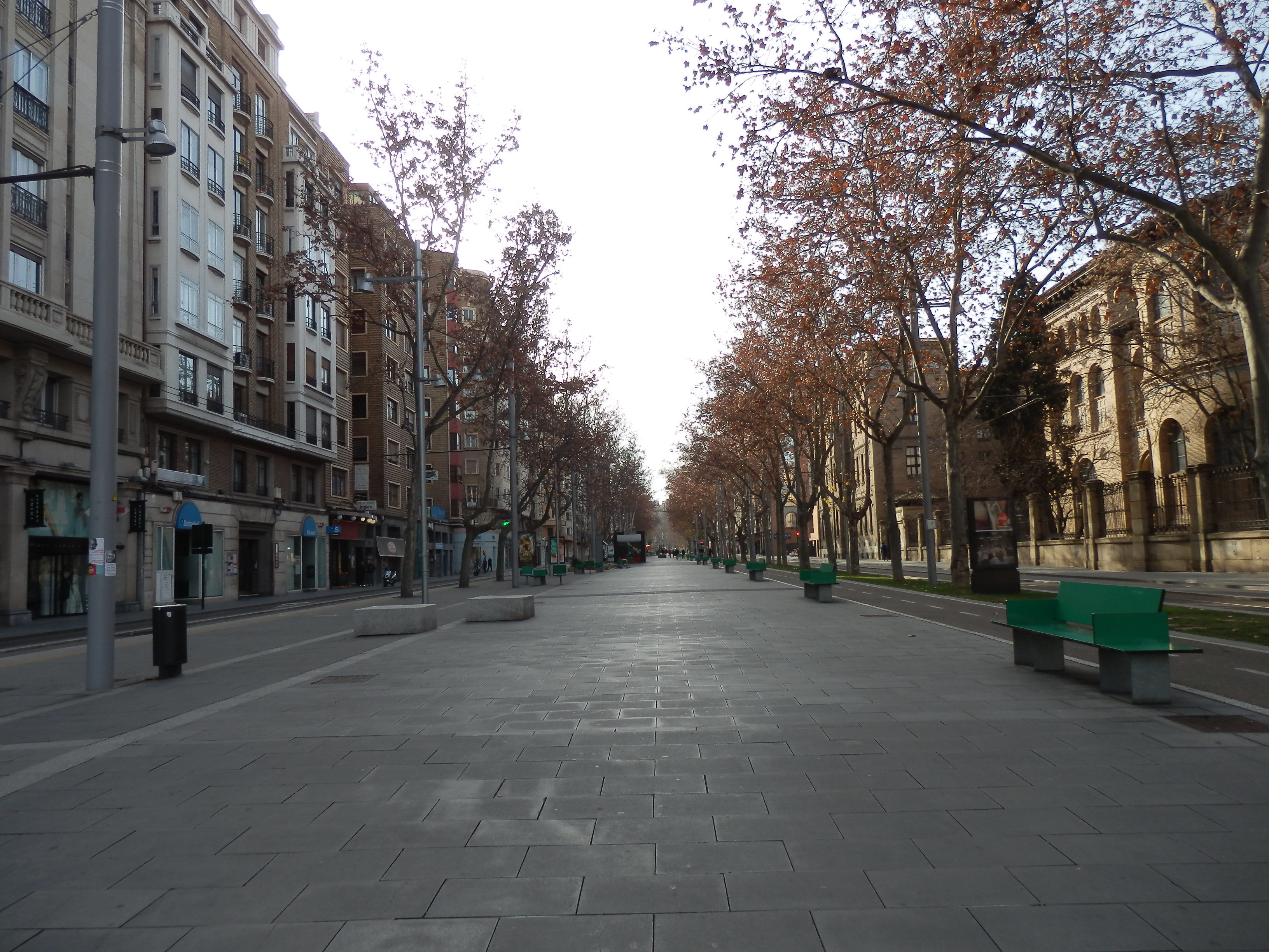 Paseo de la Gran Vía de Zaragoza.